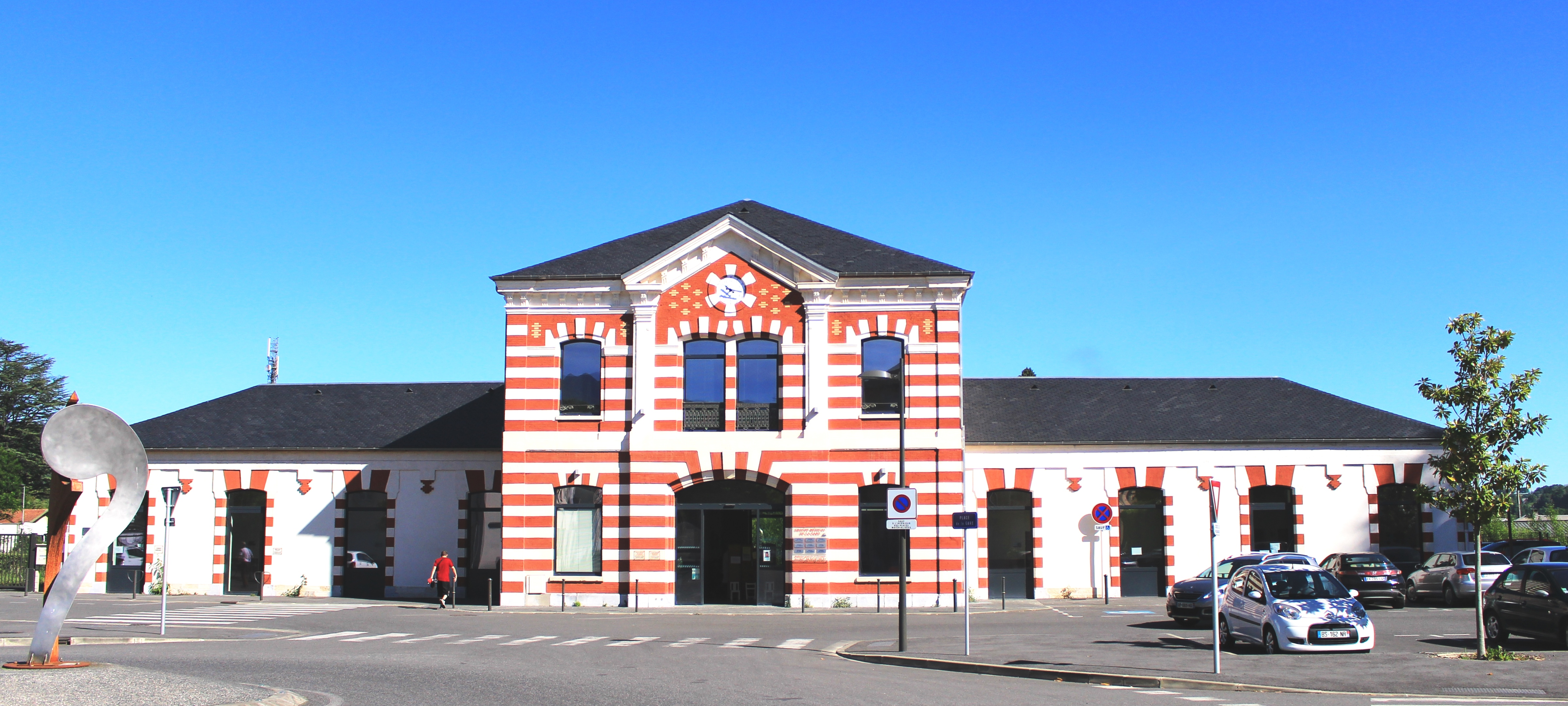 Gare de Bagnères-de-Bigorre (Hautes-Pyrénées)